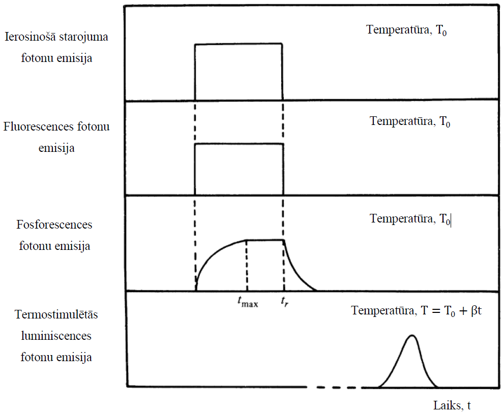 Fluorescence, fosforescences un termostimulētas luminiscences attēlojums.